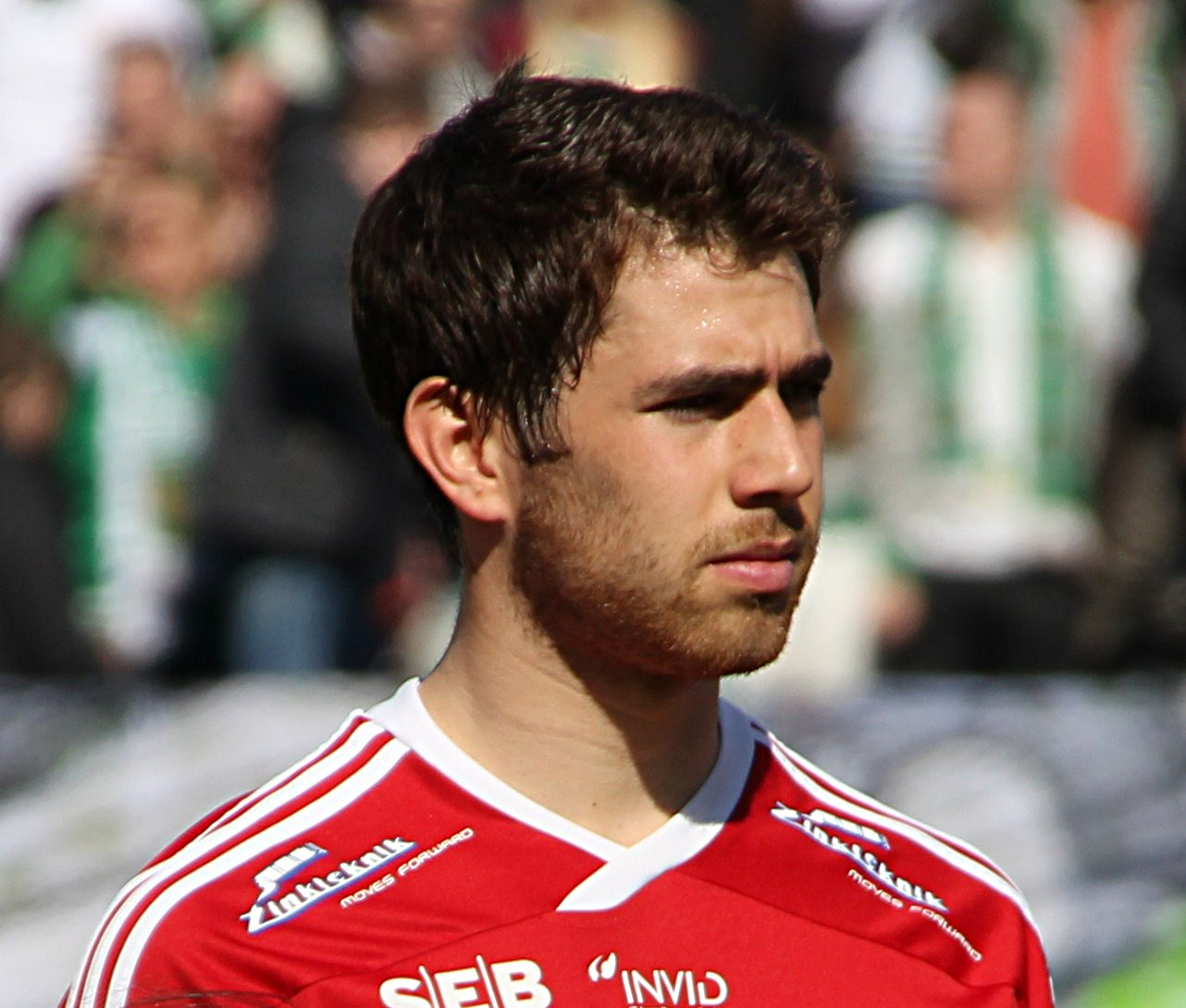 IFK Värnamos Carlos Gaete.